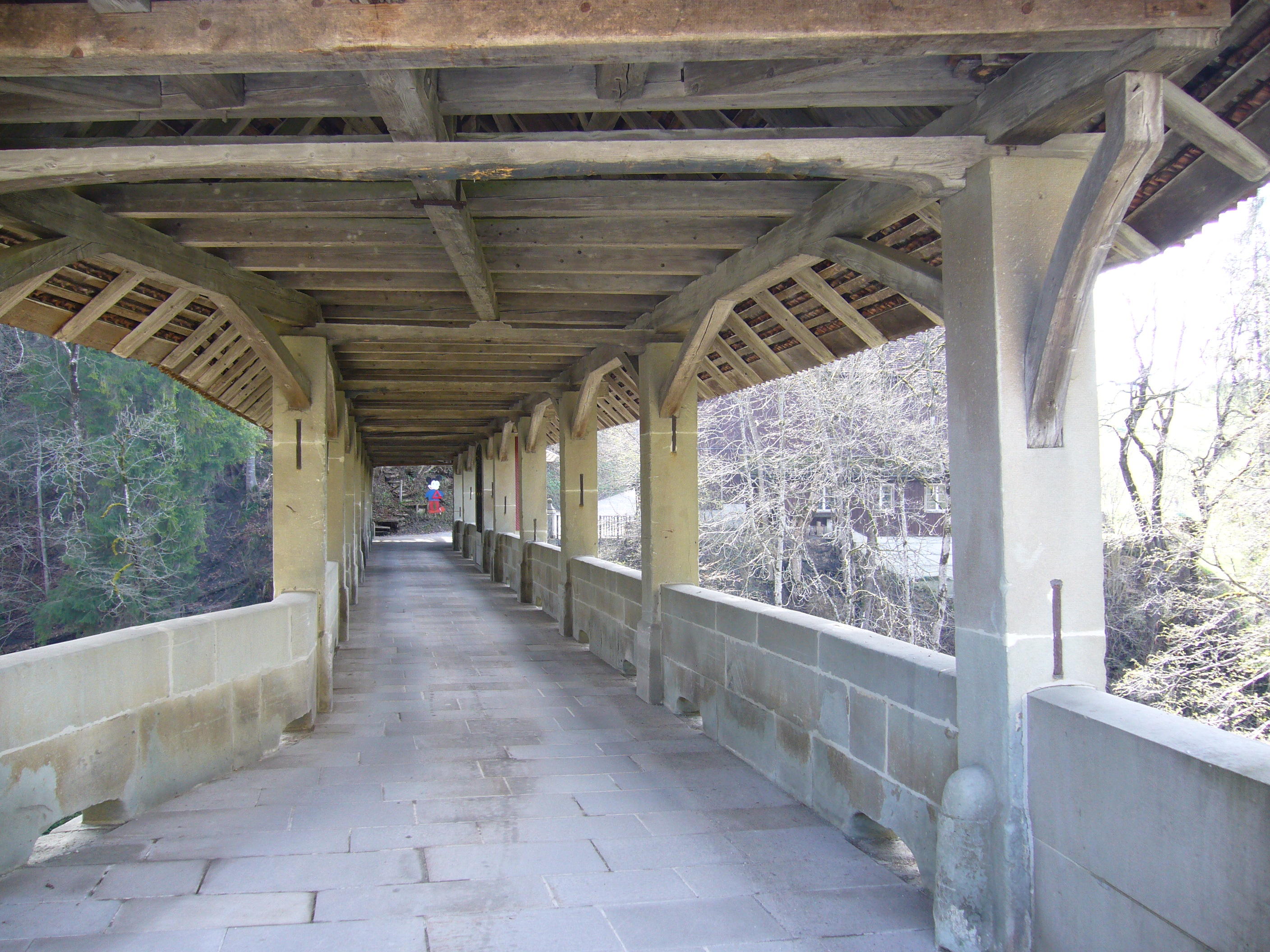 Pont du Diable dans le canton de Schwytz en Suisse